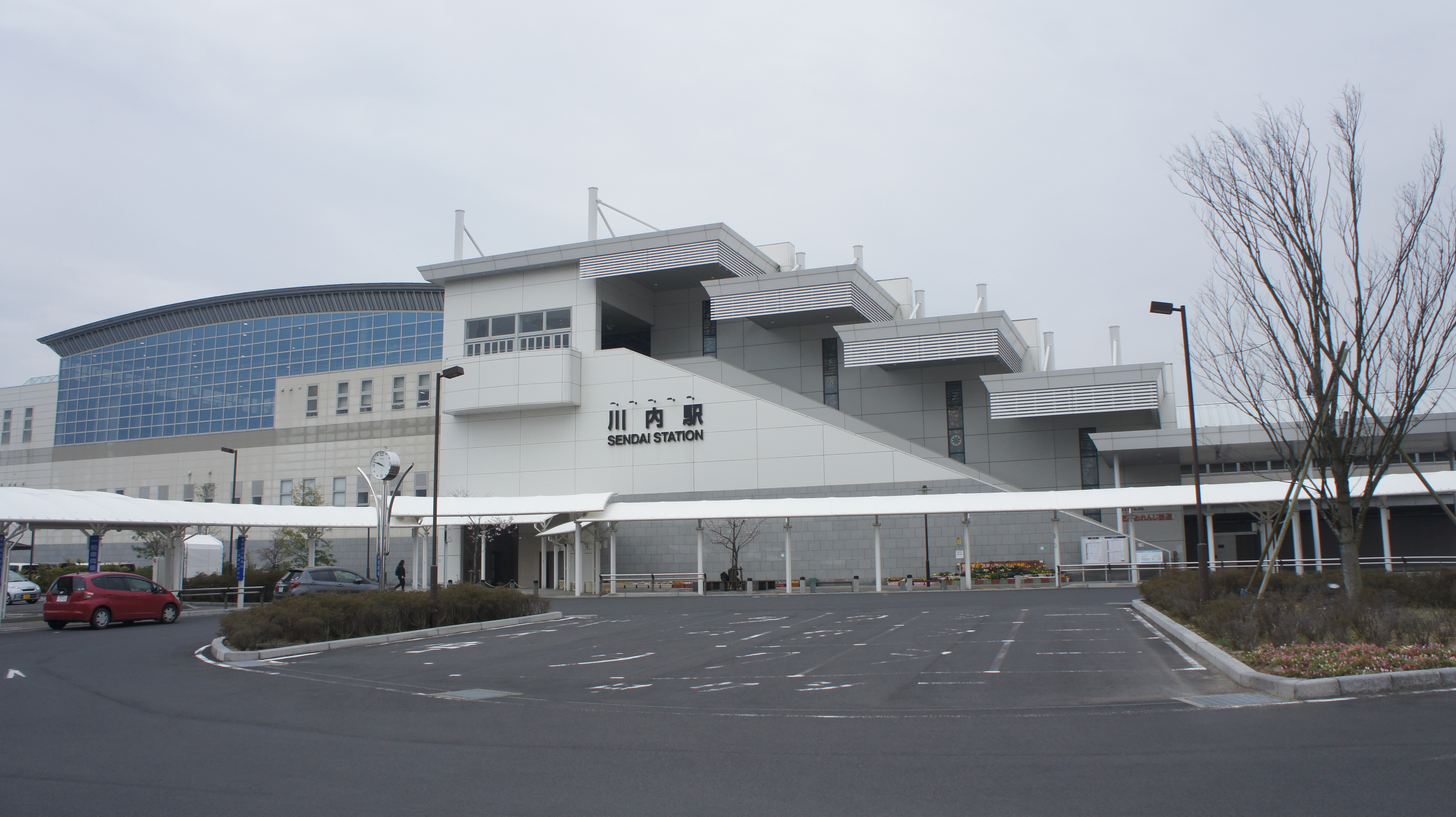 川内駅の駅舎です。